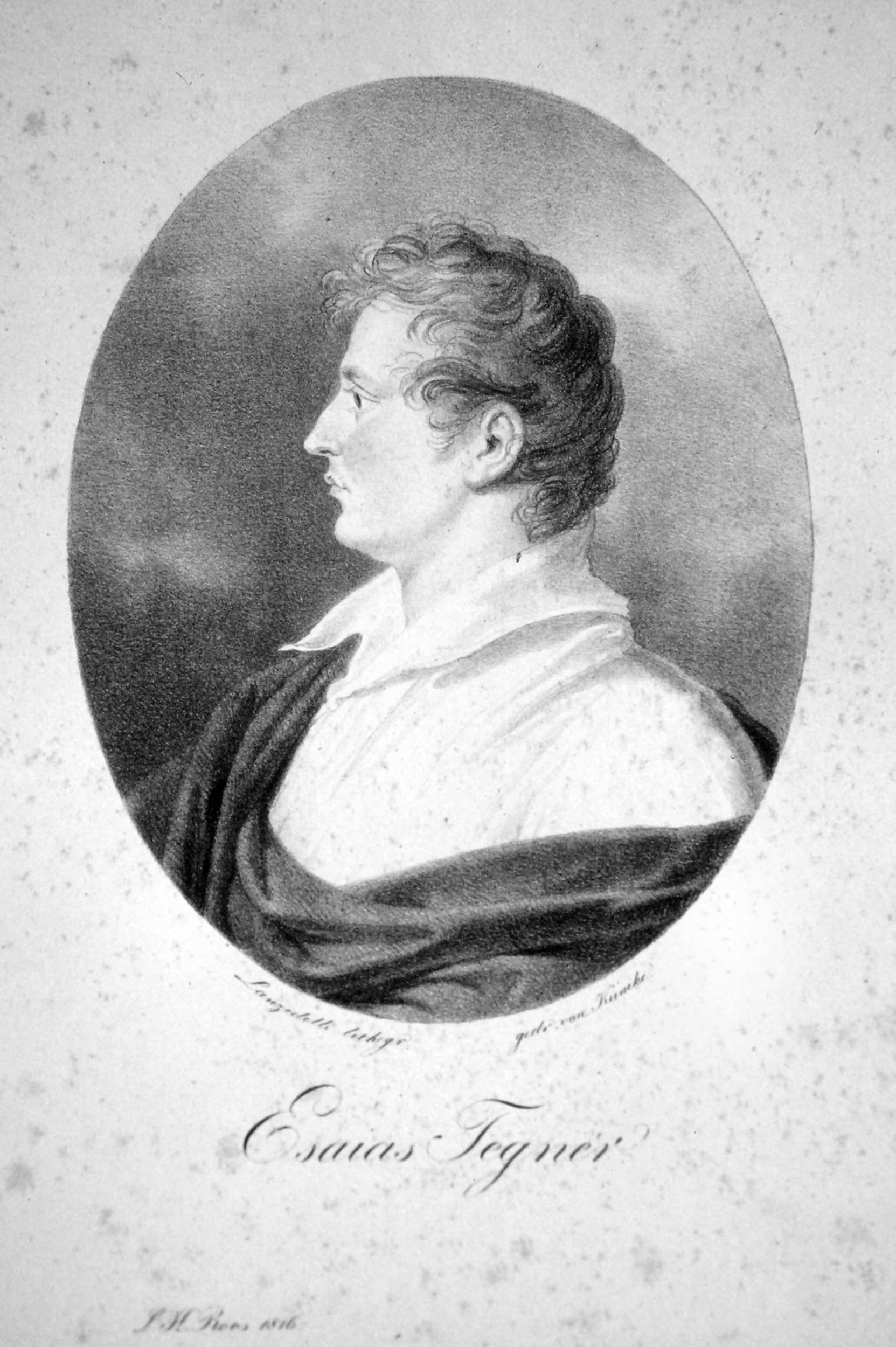 Esaias Tegnér(1782-1846), schwedischer Dichter, evangelischer Bischof. Lithographie von Josef Lanzedelli d. Ä., um 1820